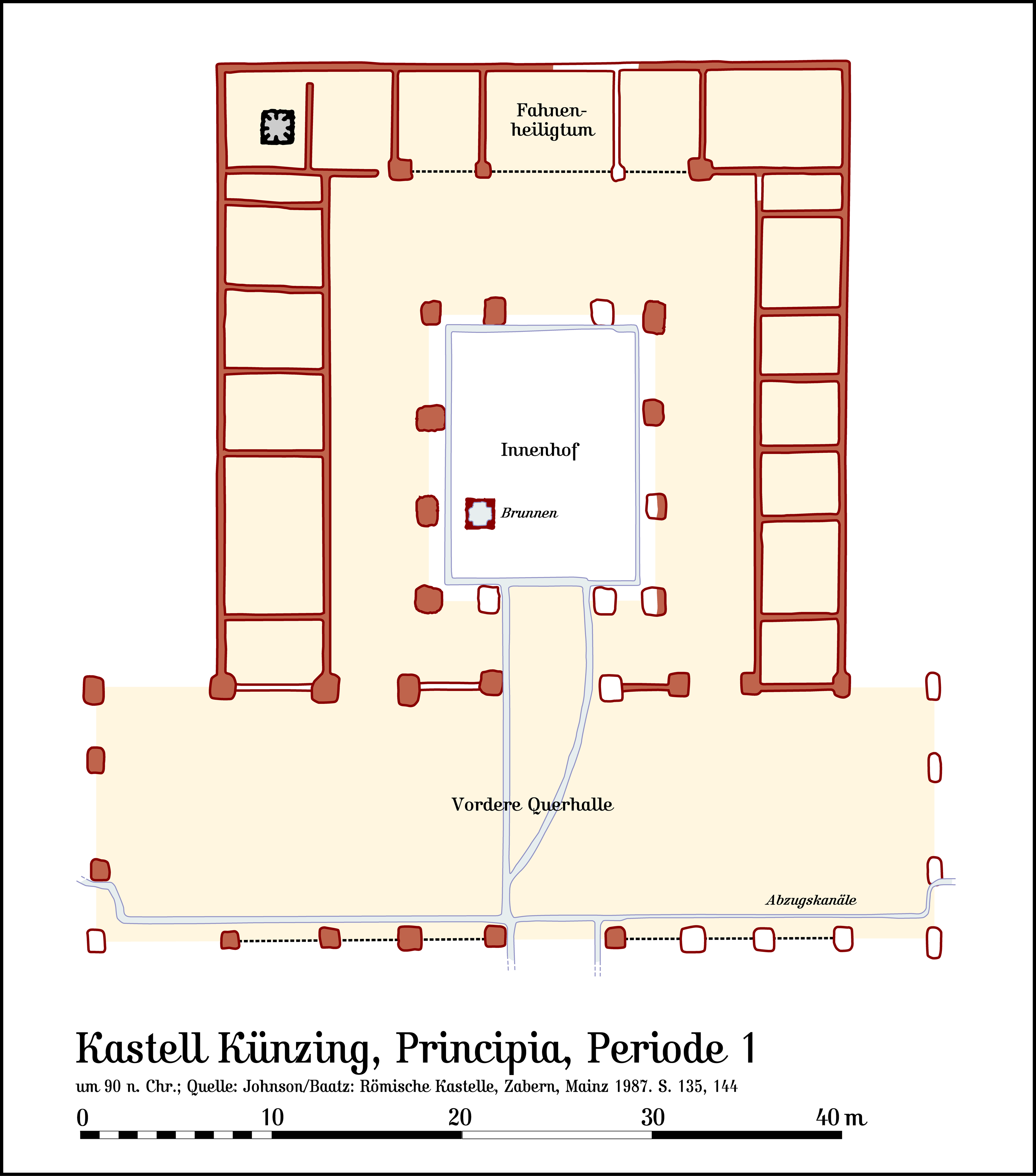 Kastell Künzing, Holz-Erde-Periode 1, Principia, um 90 n. Chr. Nähere Quellenangabe befindet sich direkt im Bild.